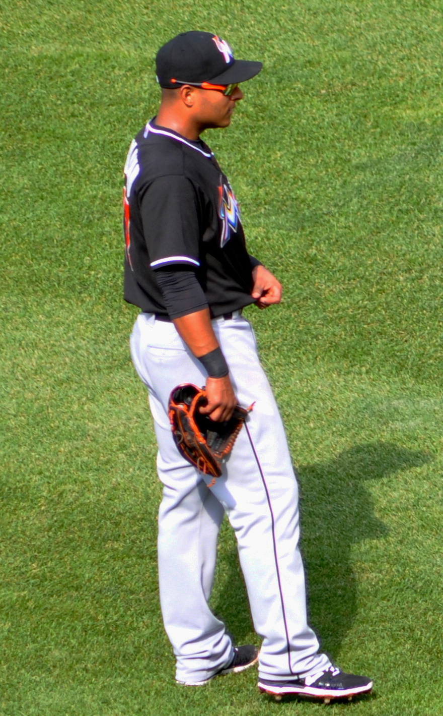 Donovan Solano